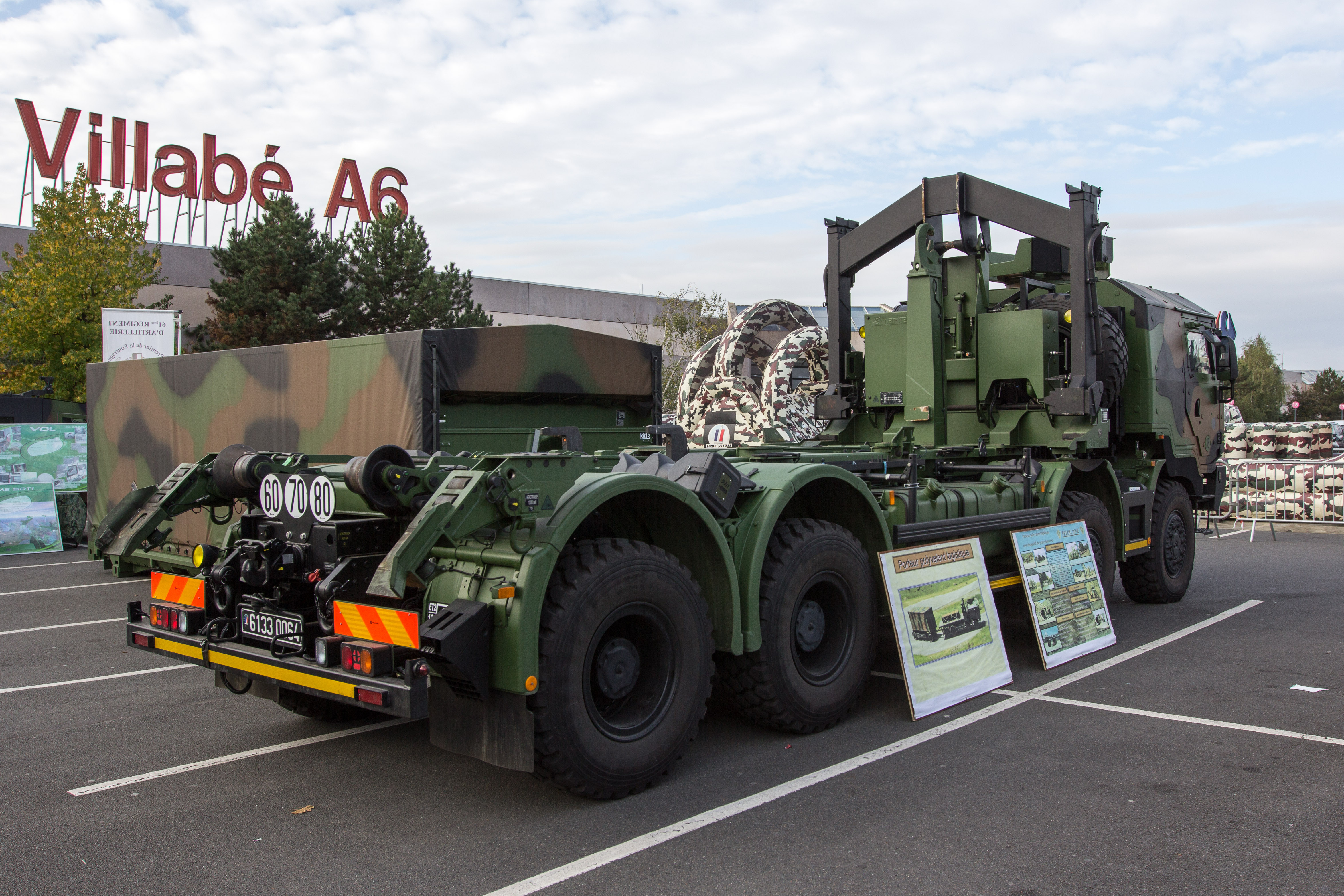 Un camion Porteur Polyvalent Terrestre PPLOG DP /Matériel présenté lors de l'exposition "Les forces armées s'invitent à villabé", du 23 au 25 octobre 2014 au Centre commercial Villabé A6 / Villabé / Essonne / France